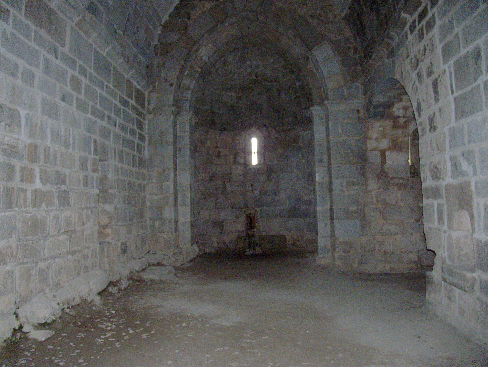 Vue intérieur en direction de l'abside, ancienne église Saint Martin (12e siècle), Corsavy (Pyrénées-Orientales, Languedoc-Roussillon, France)